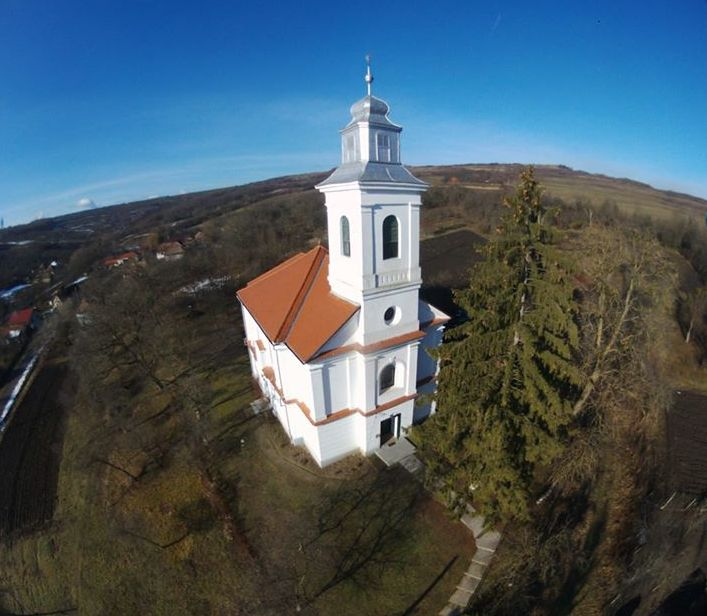 Nagydoba református templom